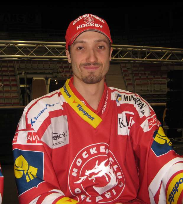 Po zakončení sezóny 2014/15 ve Werk Areně